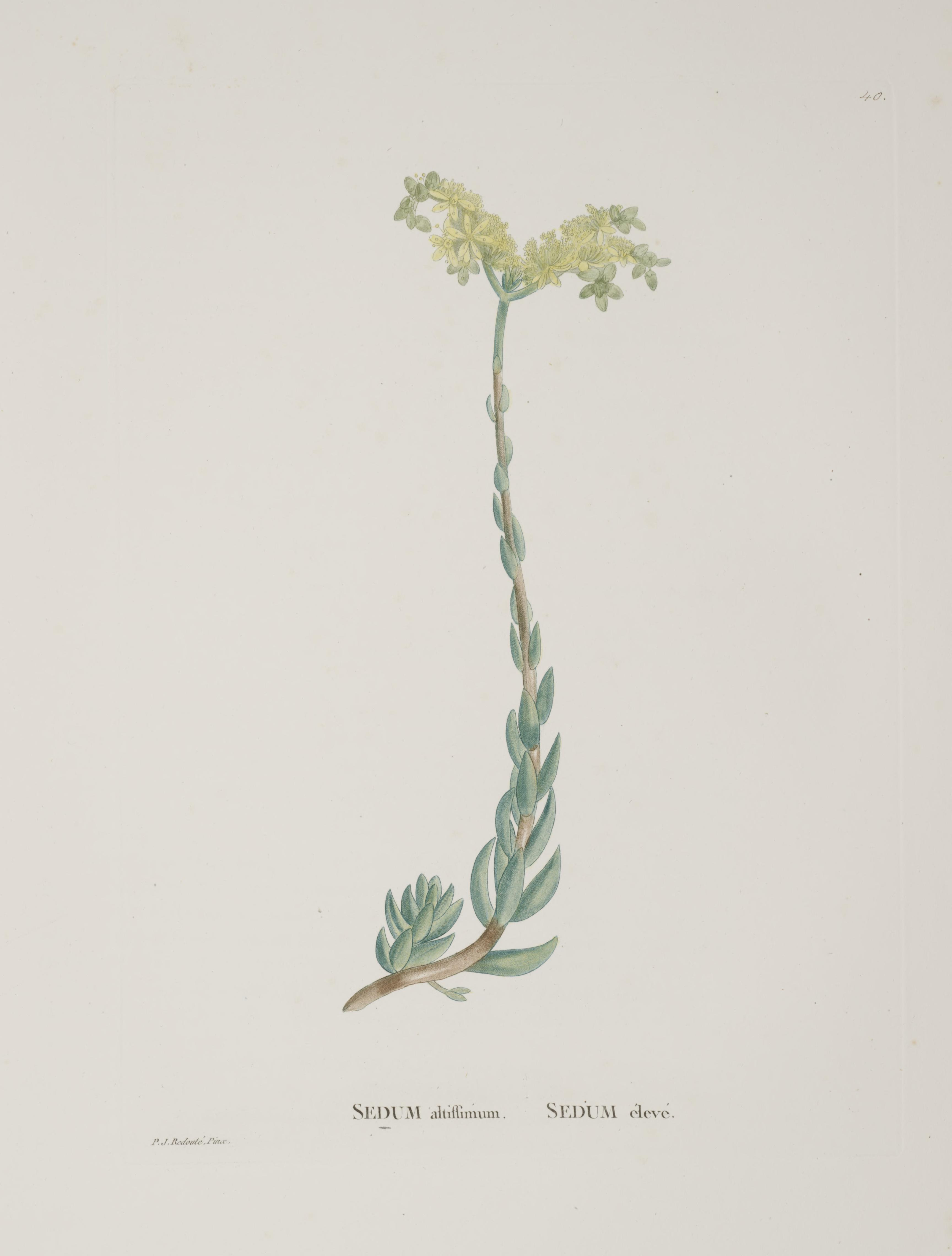 Sedum sediforme (Jacq.) Pau (syn. Sedum altissimum Poir.) Plantarum historia succulentarum =Histoire des plantes grasses /par A.P. Decandolle ; avec leurs figures en couleurs, dessinées par P.J. Redouté.